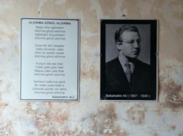 Sinp Cezaevi'nin duvarında yer alan Sabahattin Ali fotoğrafıyla ve Aldırma Gönül şiirinin sözleri.